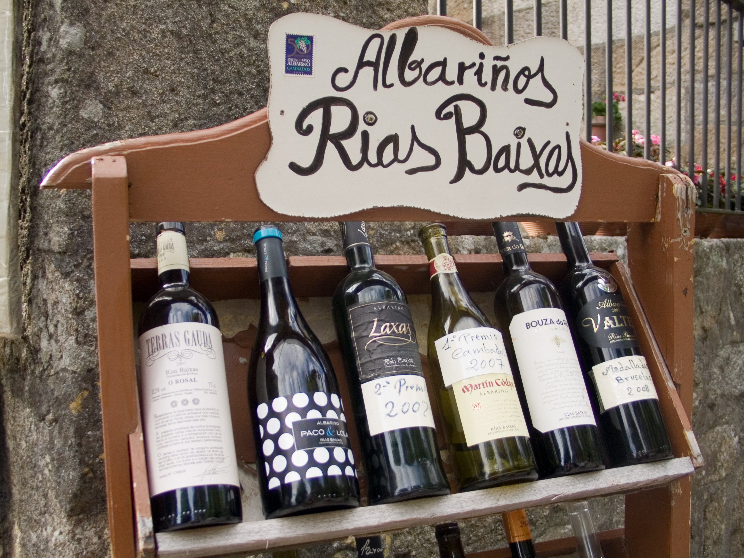 Albariños. Santiago de Compostela. Galiza